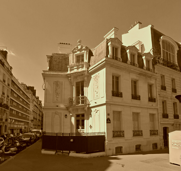 Maison 19 Rue de Prony a Paris.